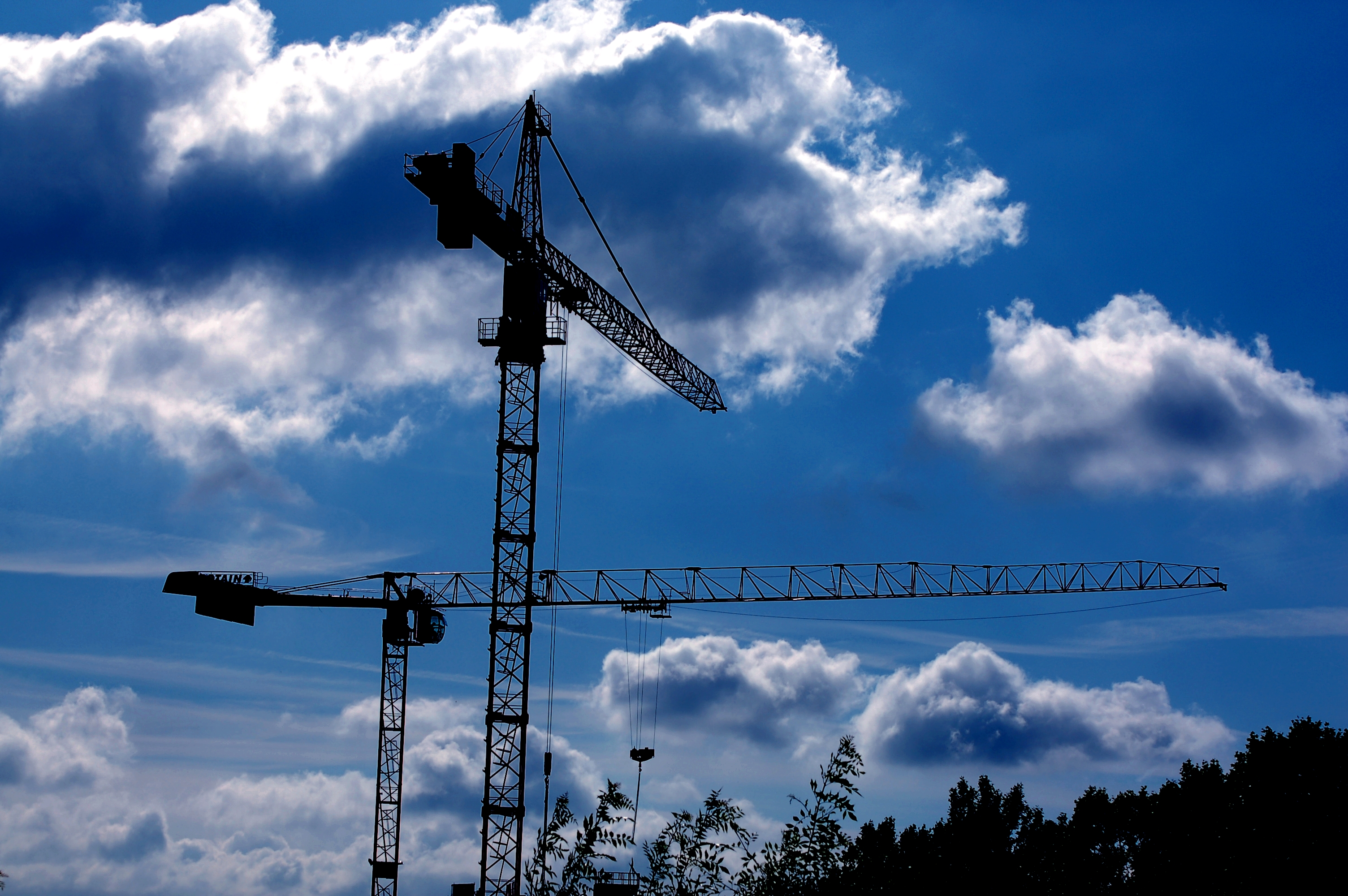 Exemple de grues de chantiers de construction.